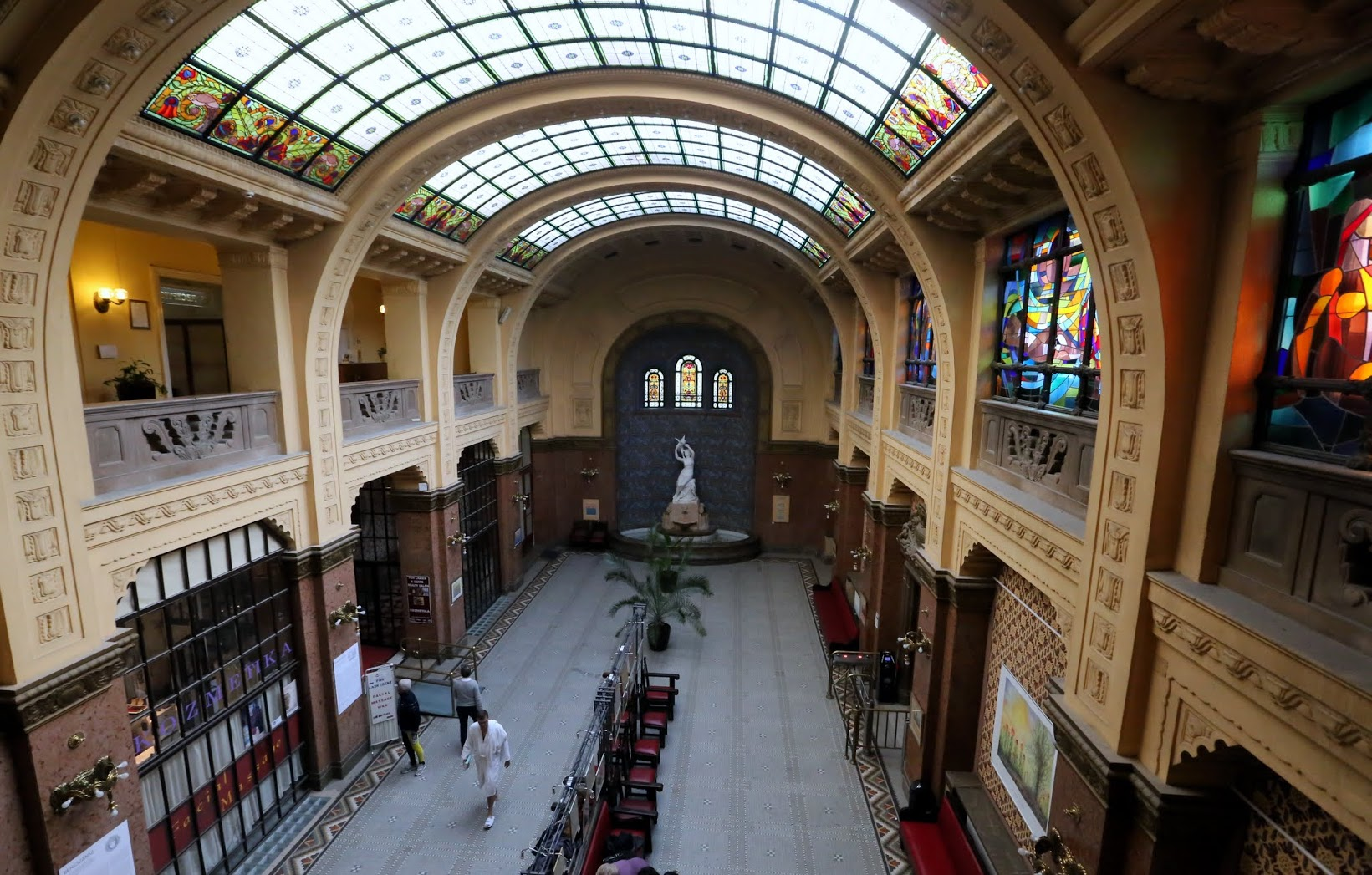 Gellért Fürdő, Budapest